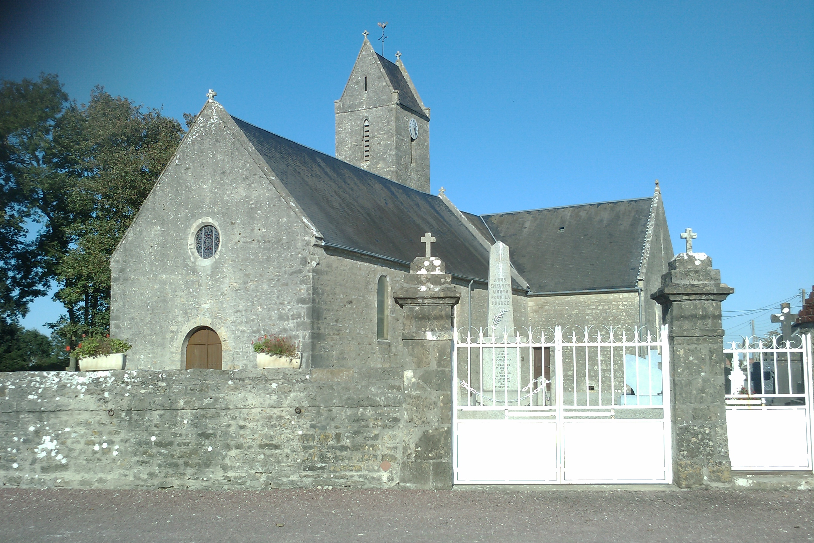 Église Saint-Pierre de Coigny